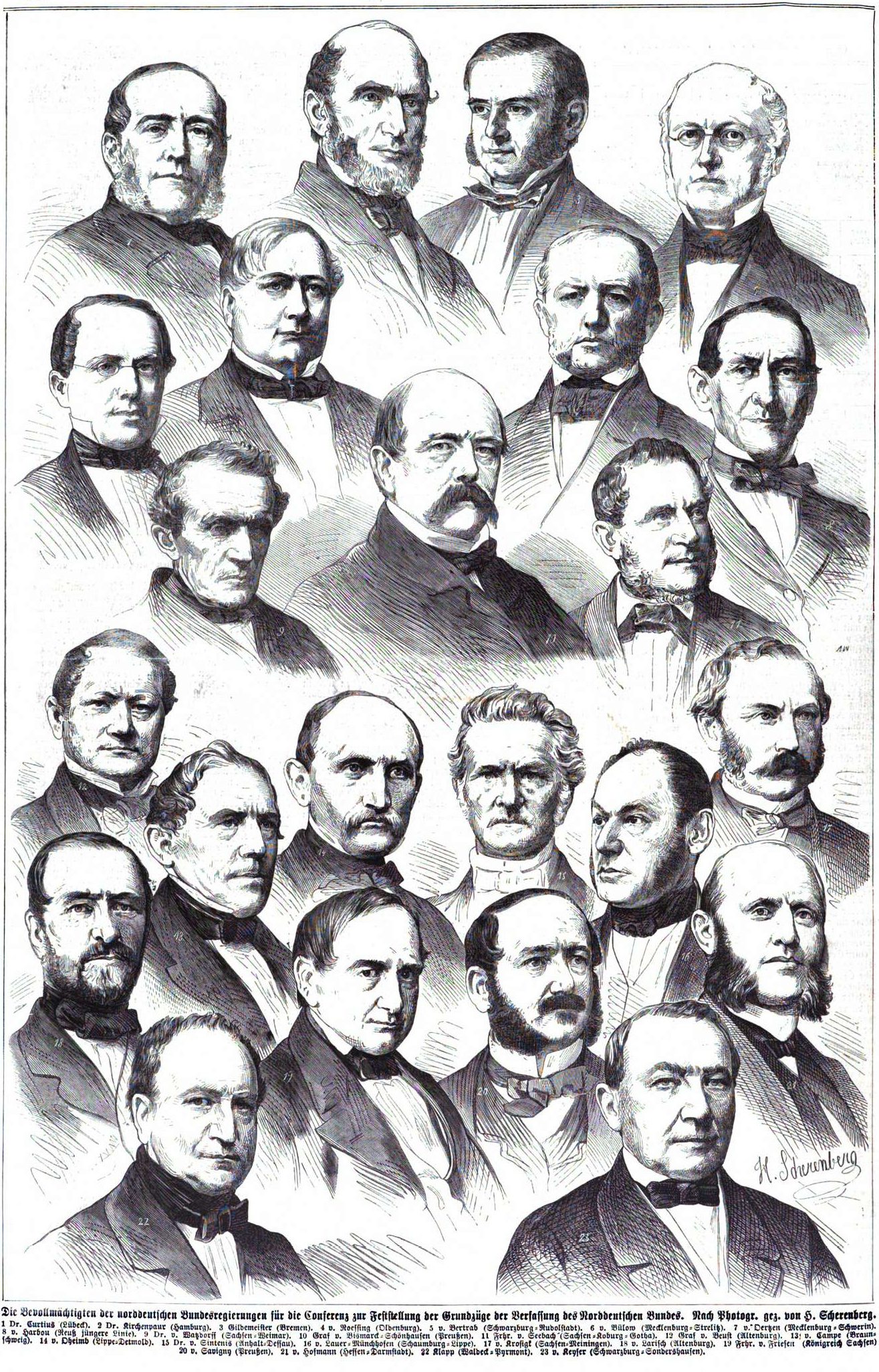 Sammelbild der Bevollmächtigten der einzelnen Bundesstaaten für die Verfassungskonferenz des Norddeutschen Bundes 1867.